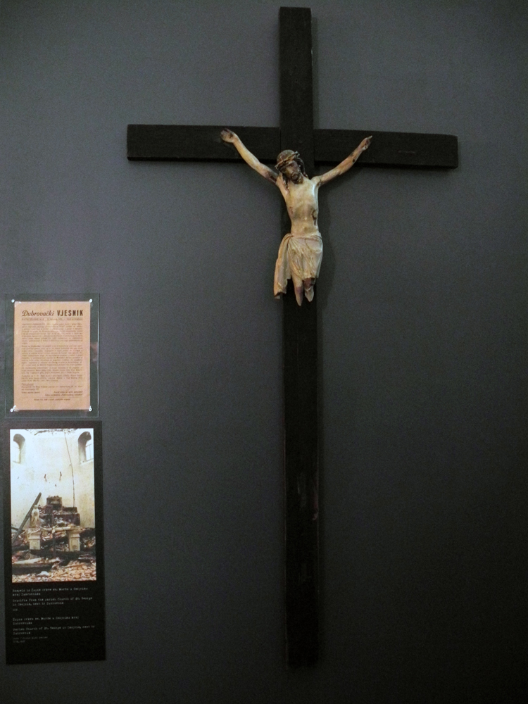 Izložba Domovinski rat u Hrvatskom povijesnom muzeju tijekom Noći muzeja.